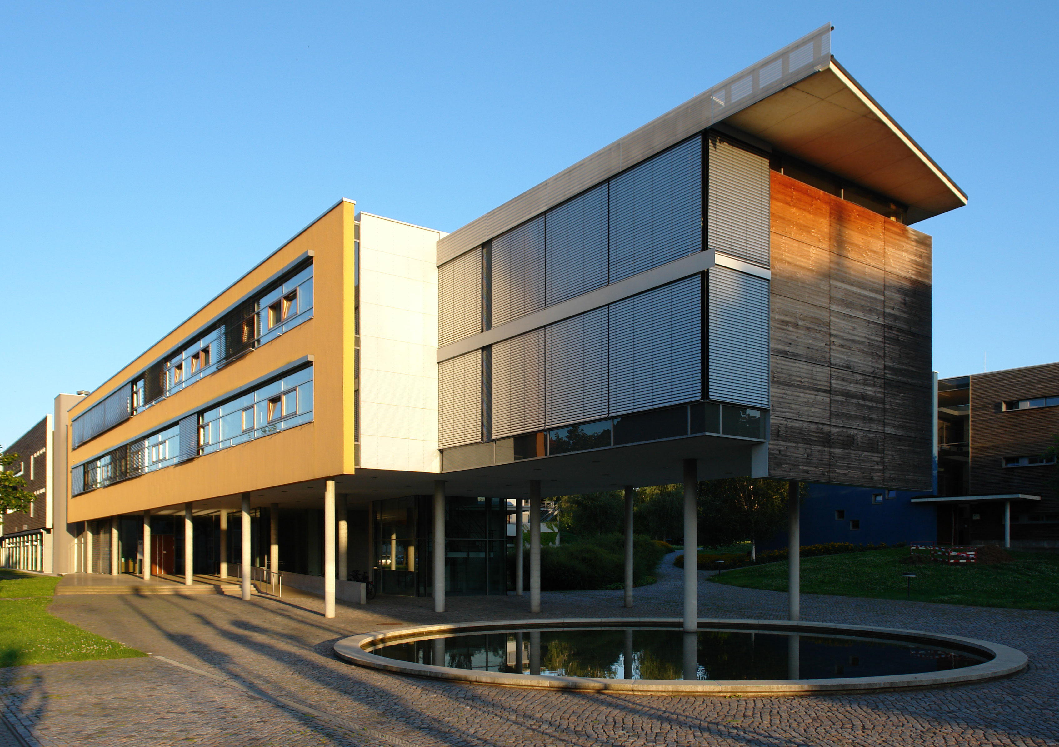 Max-Planck-Institut für Physik komplexer Systeme (MPI PKS)